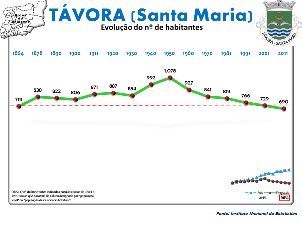 Censos 1864/2011